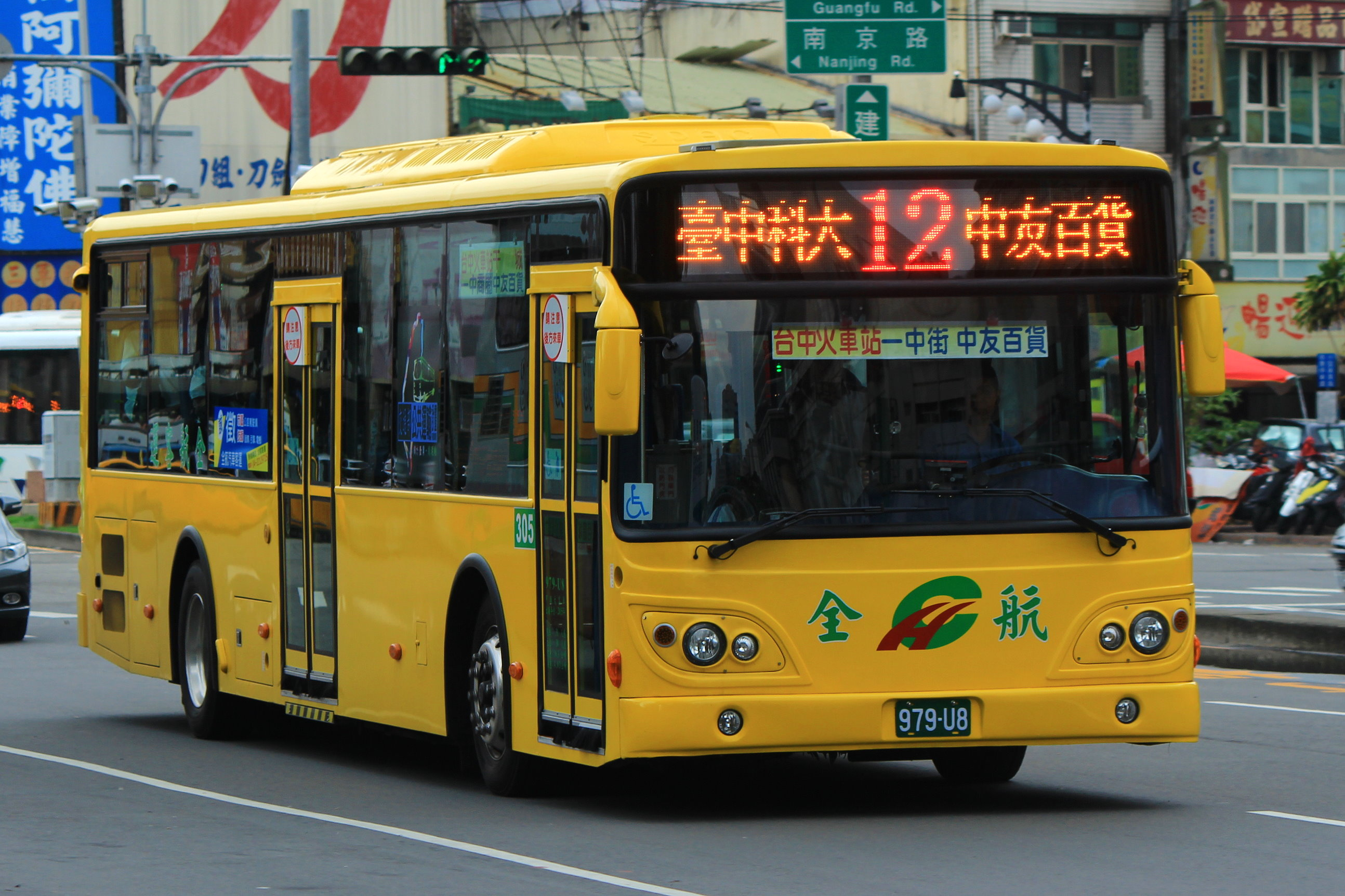 12路 干城站